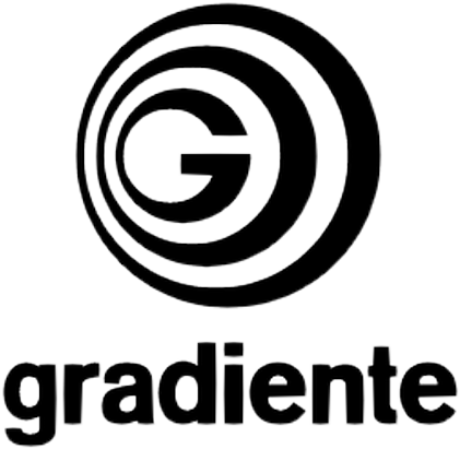 Logotipo da Gradiente.